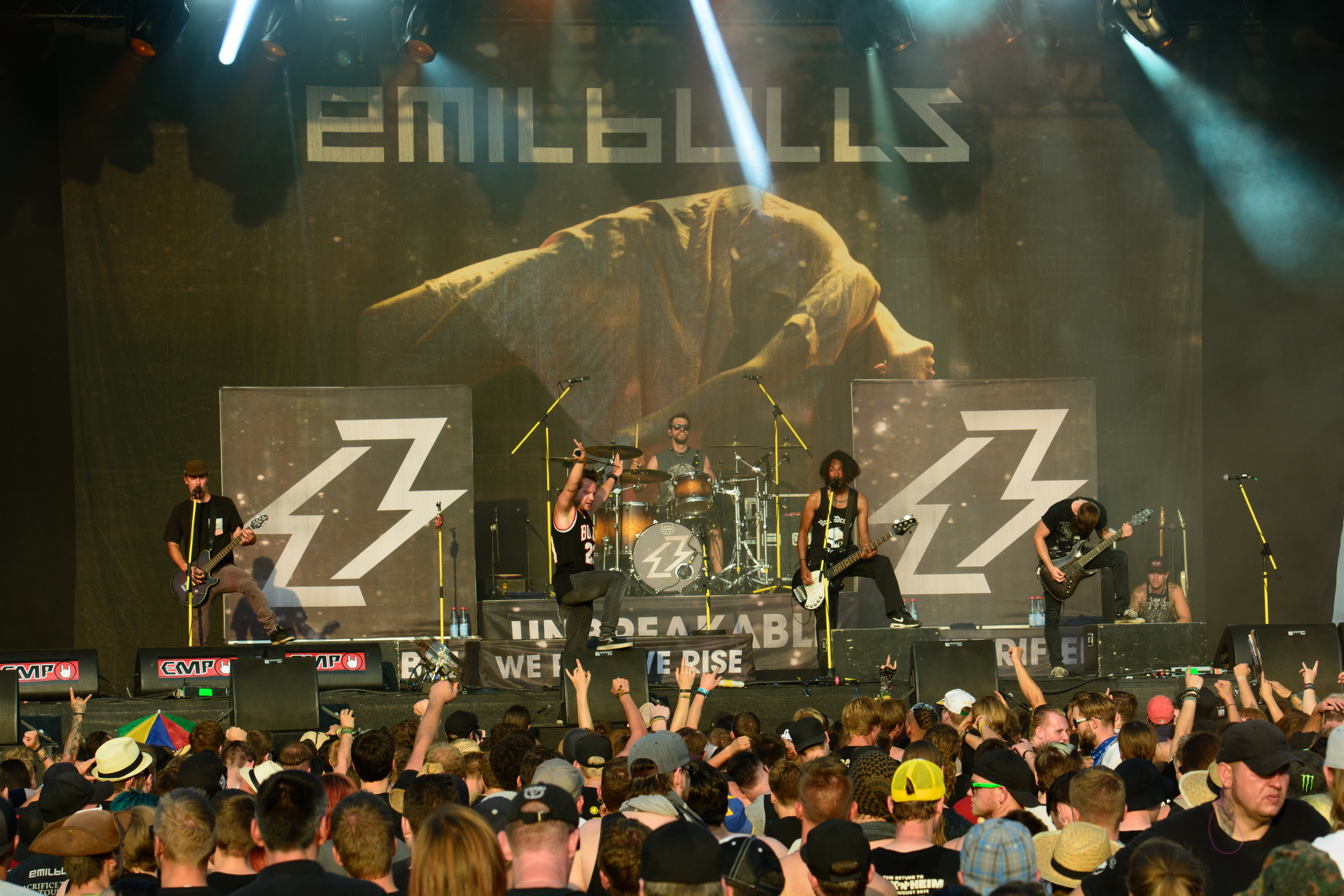 Emil Bulls beim Reload Festival 2016 in Sulingen